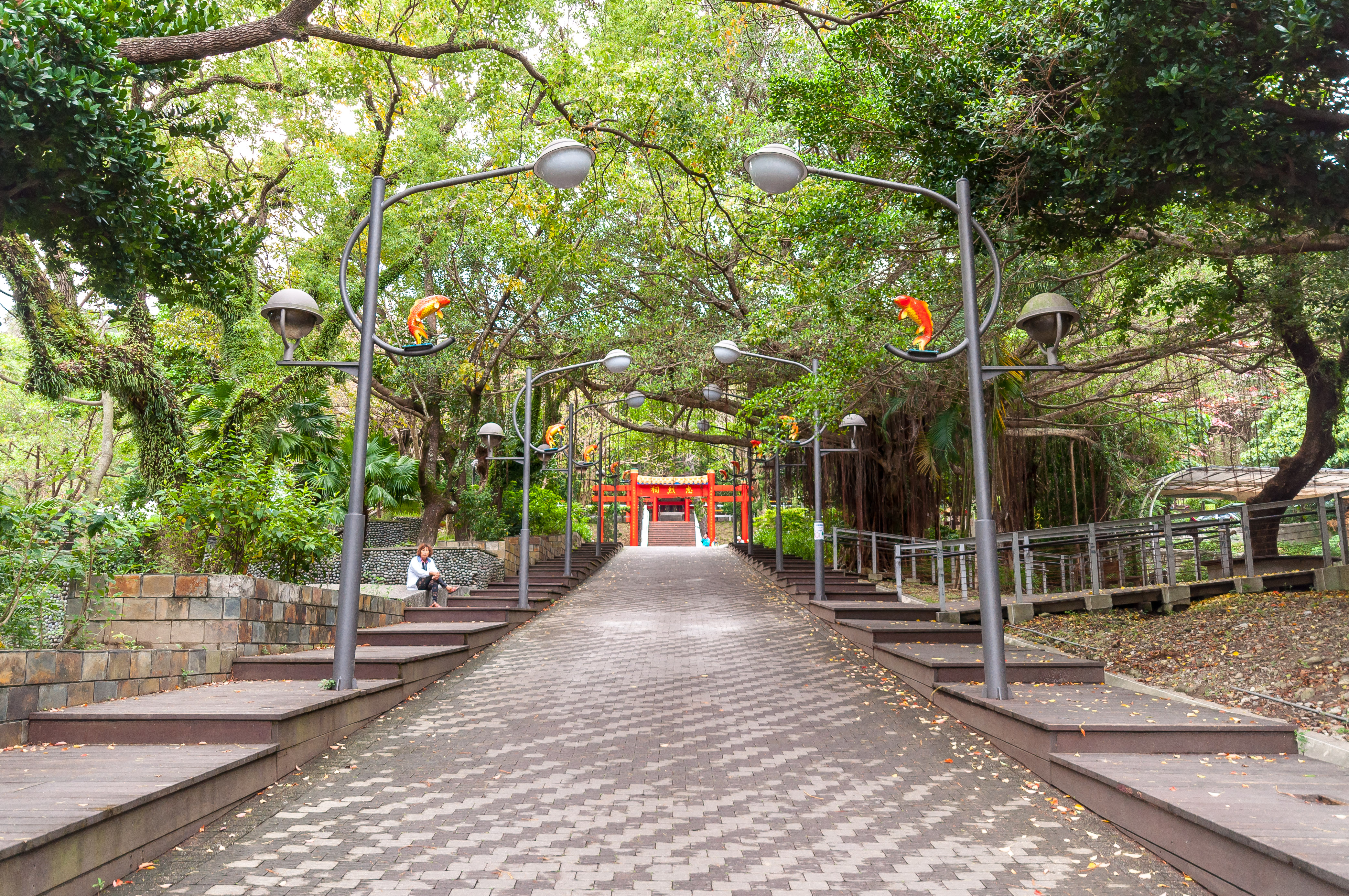 台東鯉魚山忠烈祠前坡道